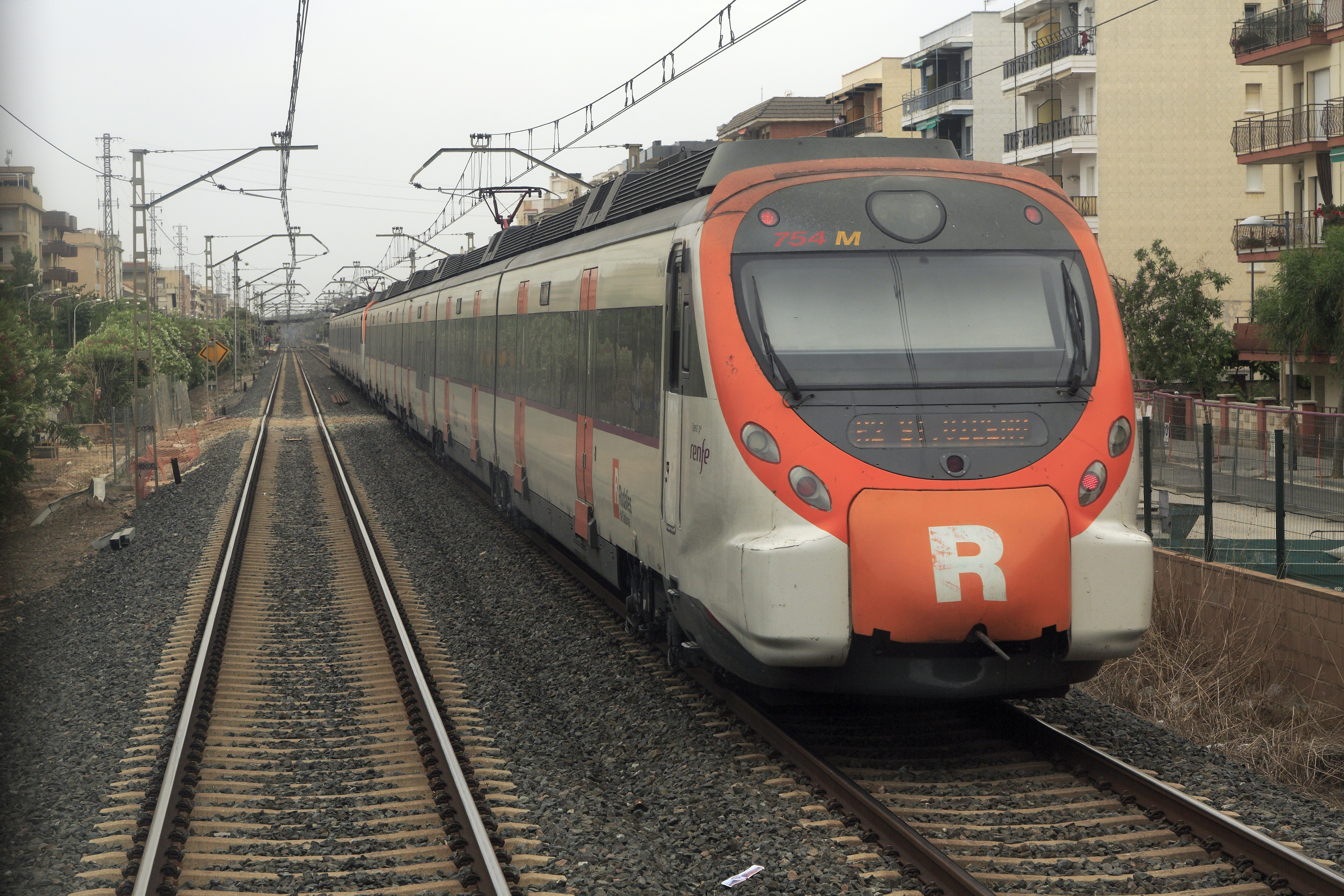 »Civia«-Doppeleinheit nach San Vincenç de Calders, Nachschuss.